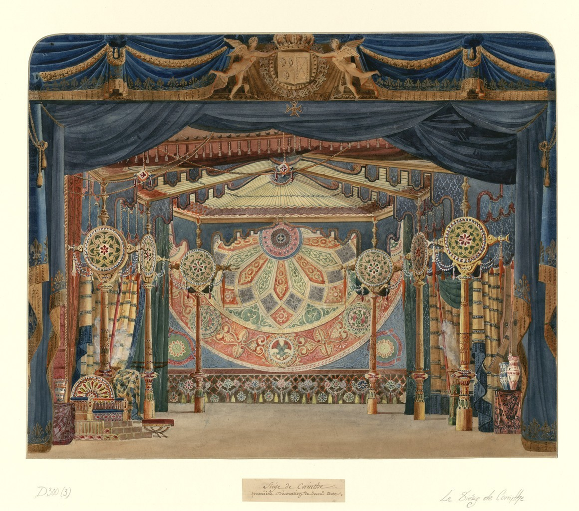 Tente de Mahomet, décor de l'acte II du Siège de Corinthe esquissé par Auguste Caron